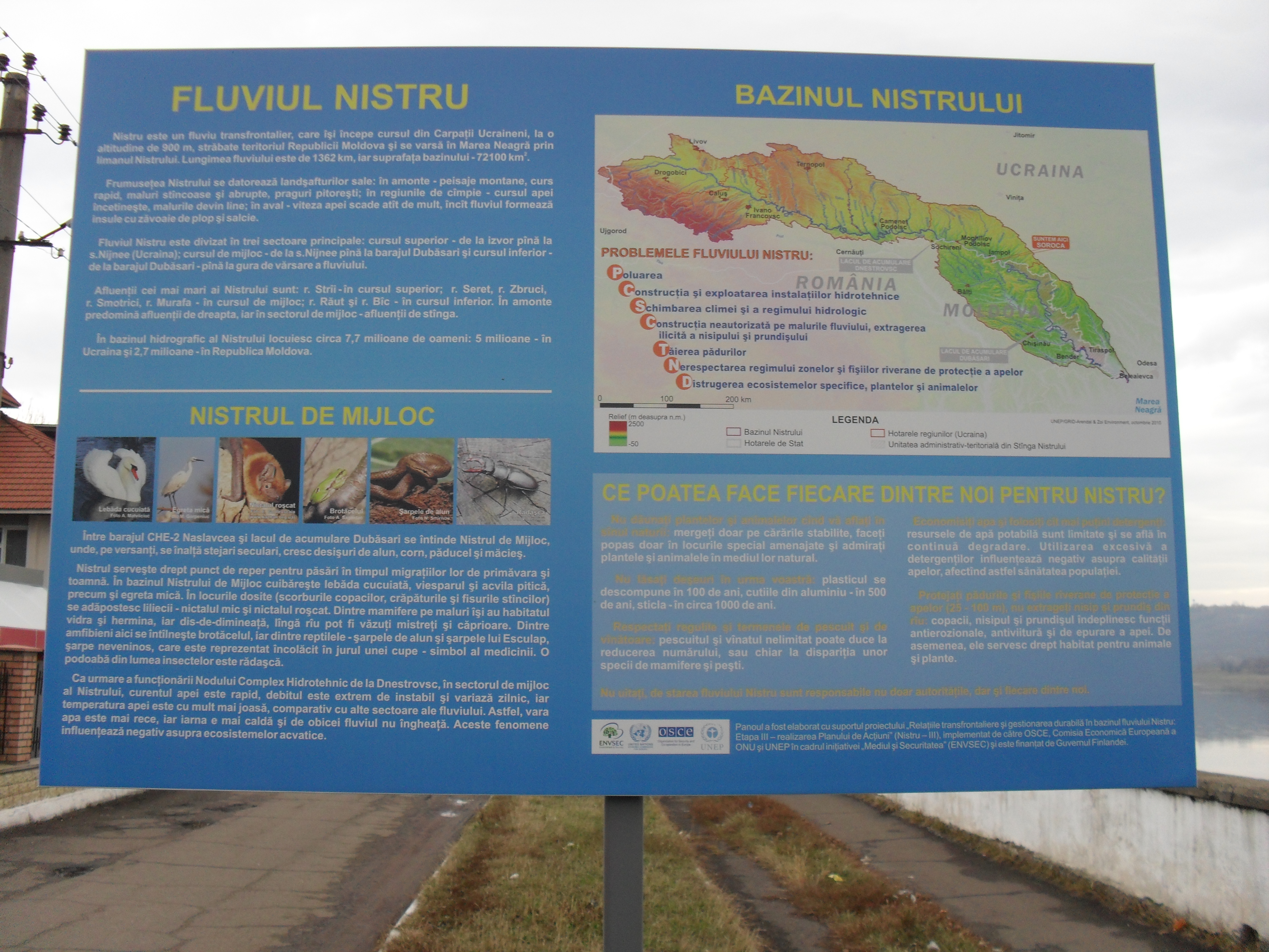 м. Сороки.